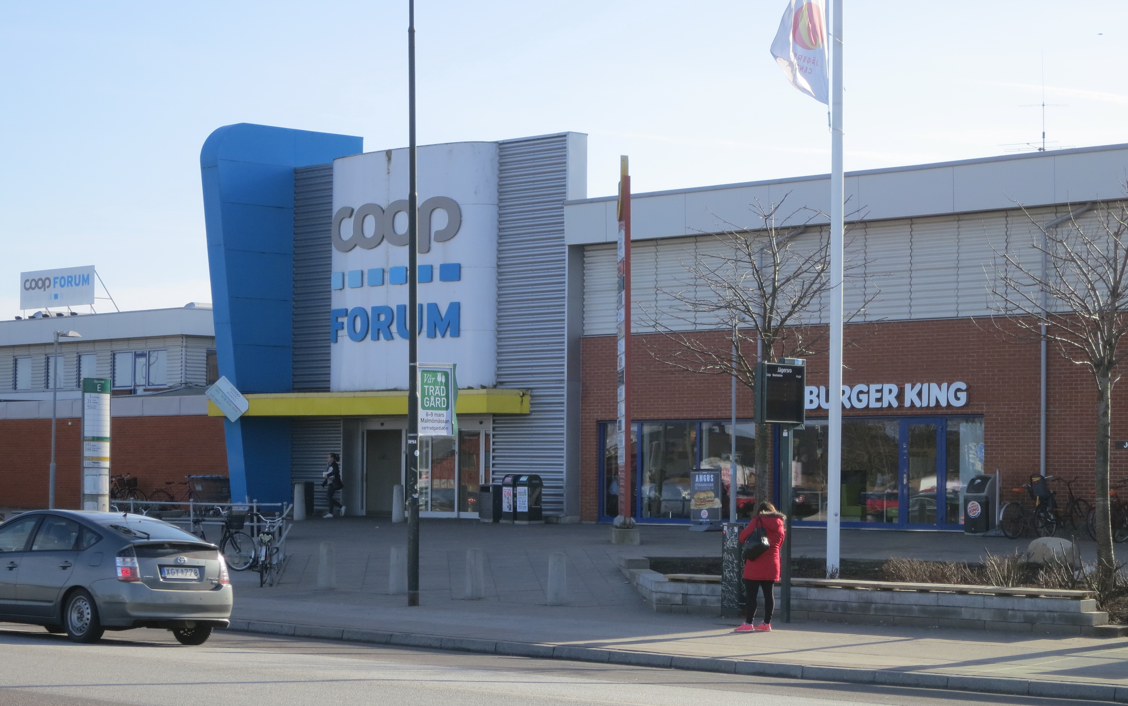 Coop forum, Jägersro